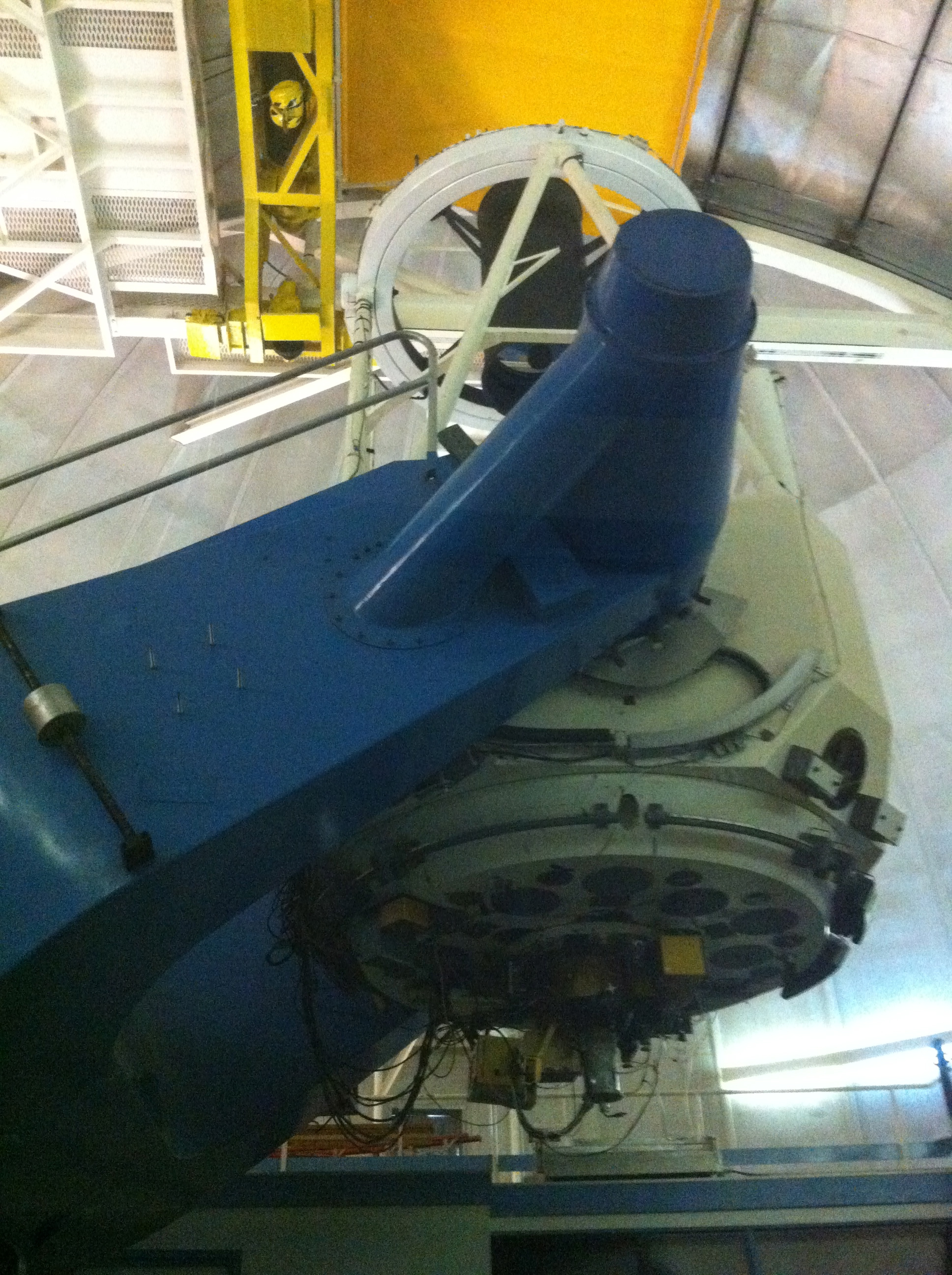 Telescope